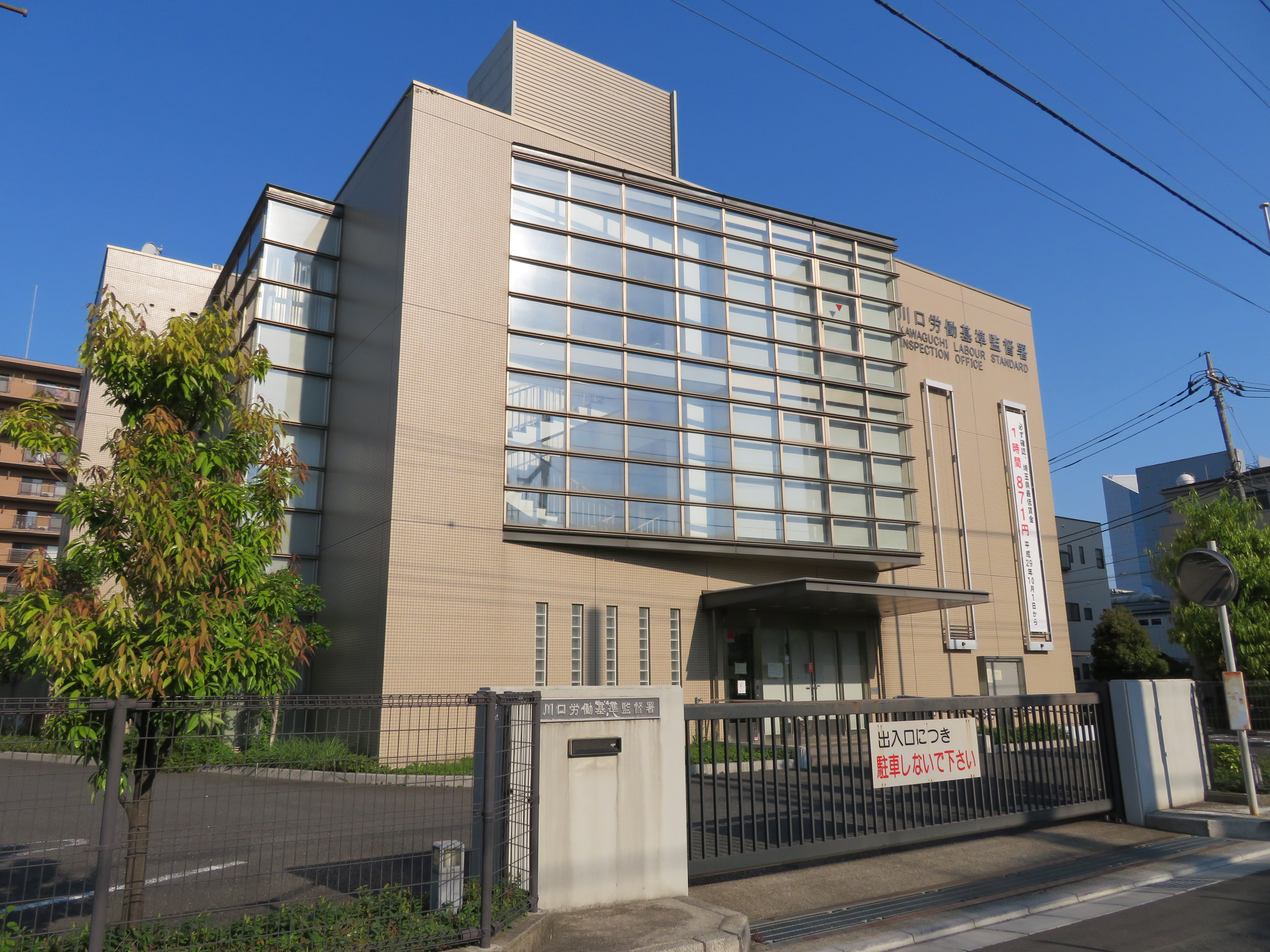 川口労働基準監督署庁舎 Canon PowerShot SX720 HS